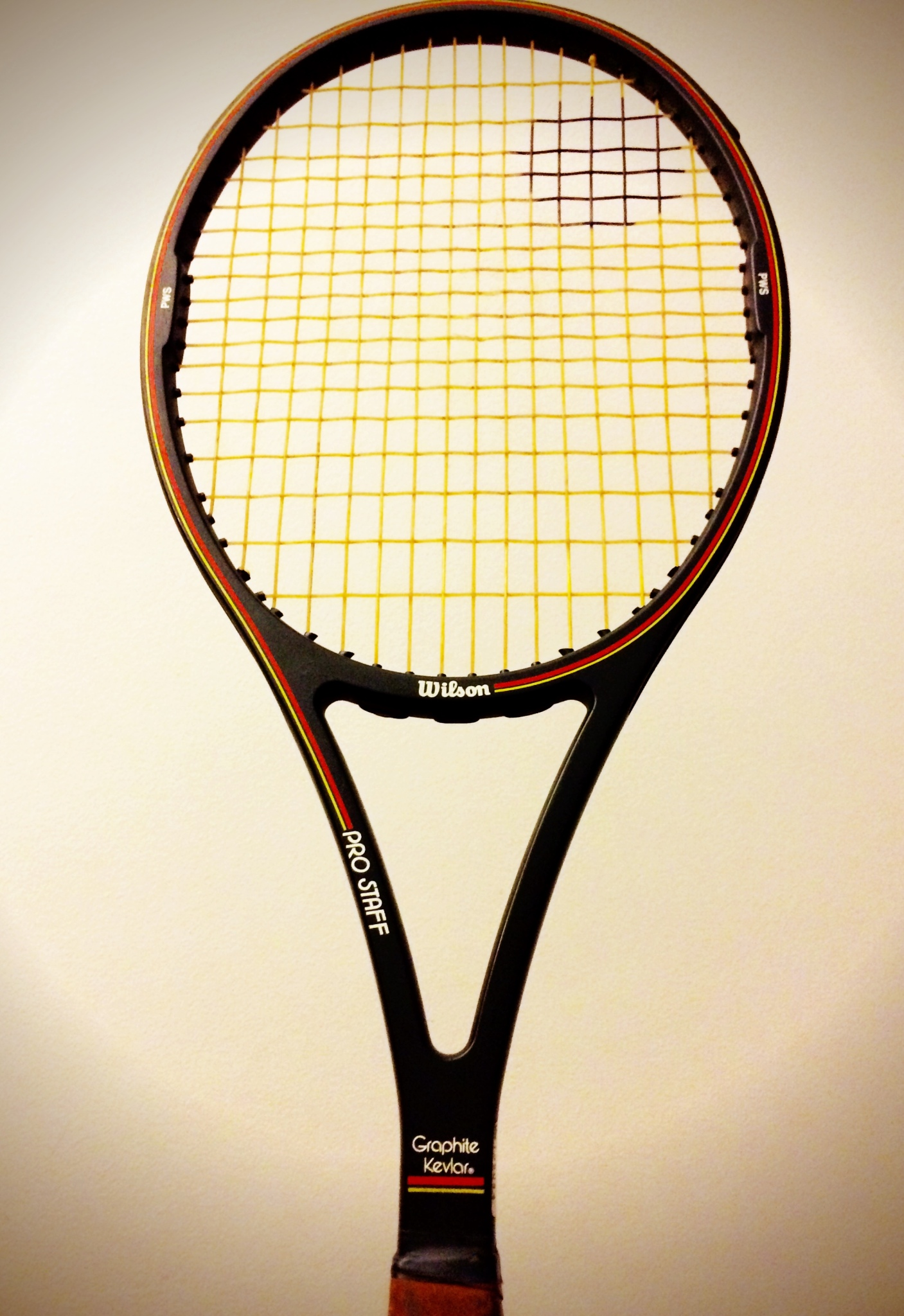 Racquet Wilson ProStaff 6.0 Original